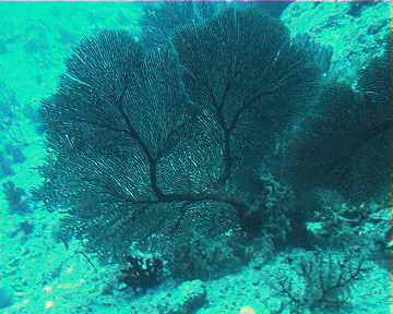 Hornkoralle ( Fächerkoralle )